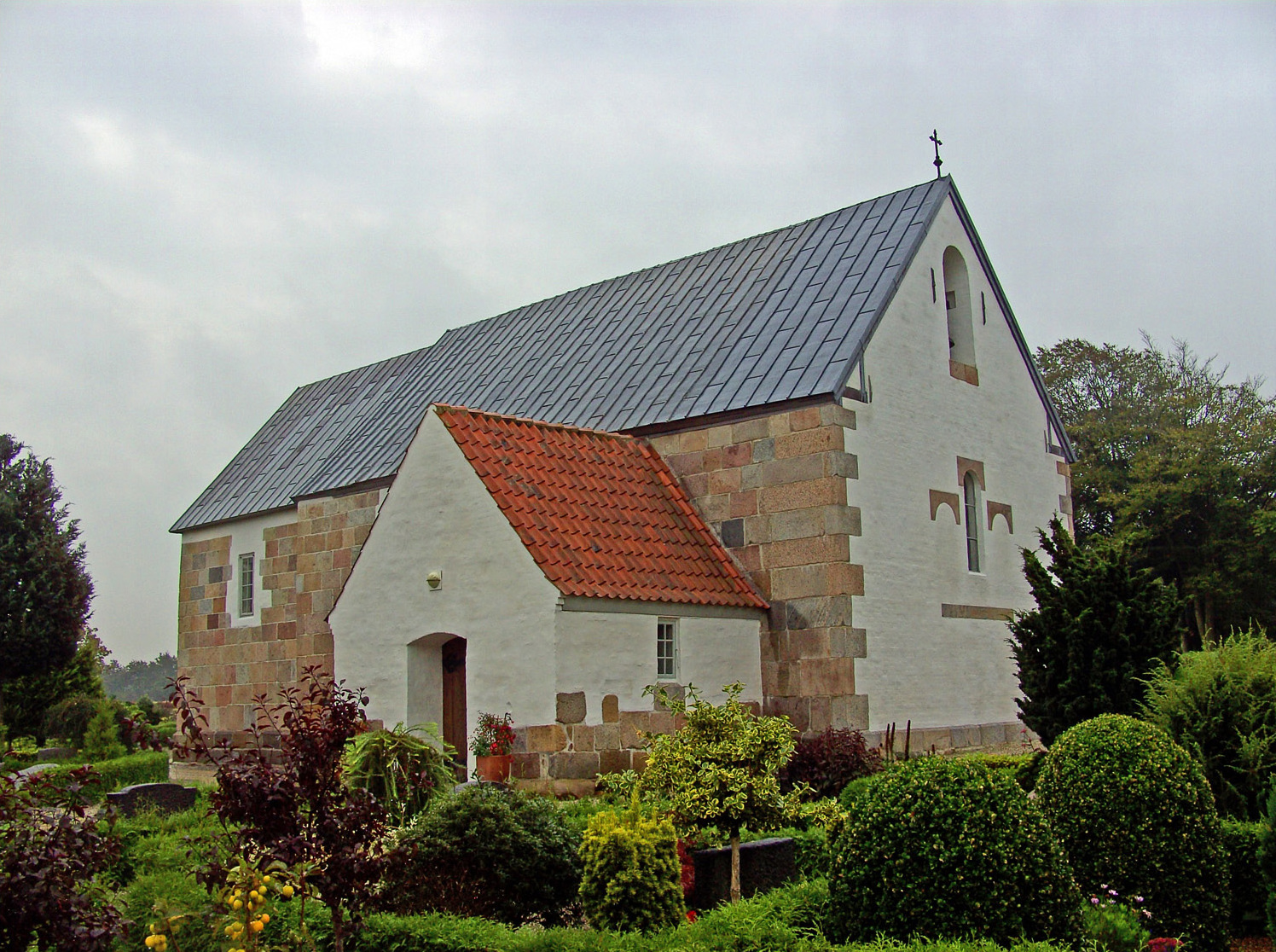 fra nordvest